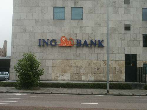 Amsterdam Zuidoost, ING Building